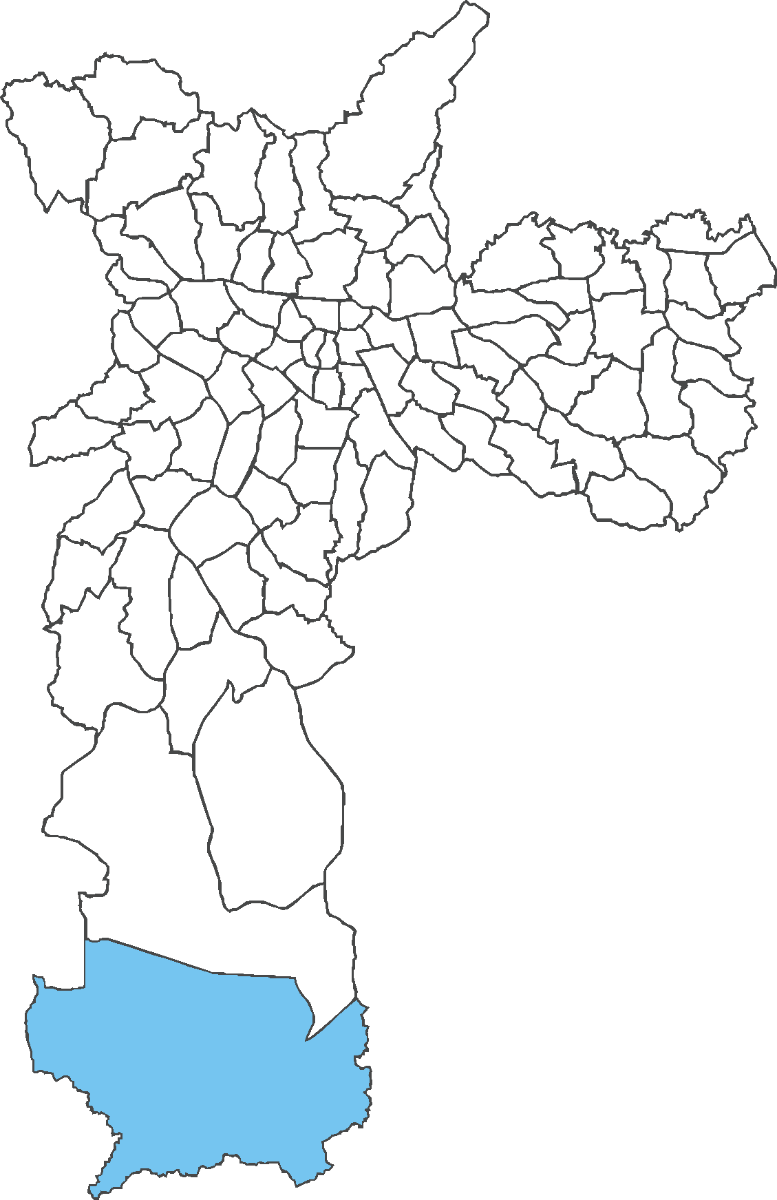 Localização do distrito de Marsilac no município de São Paulo.